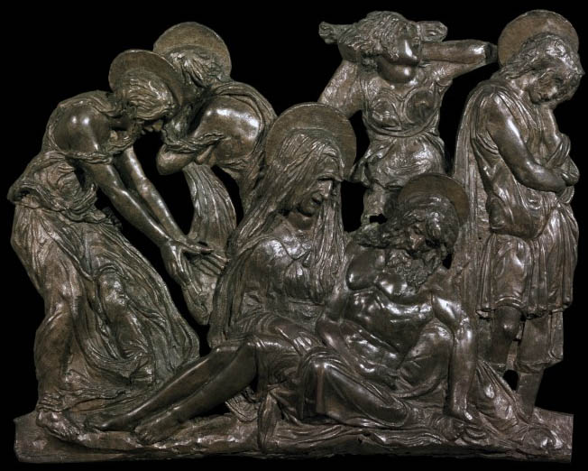 Compianto del cristo morto, donatello